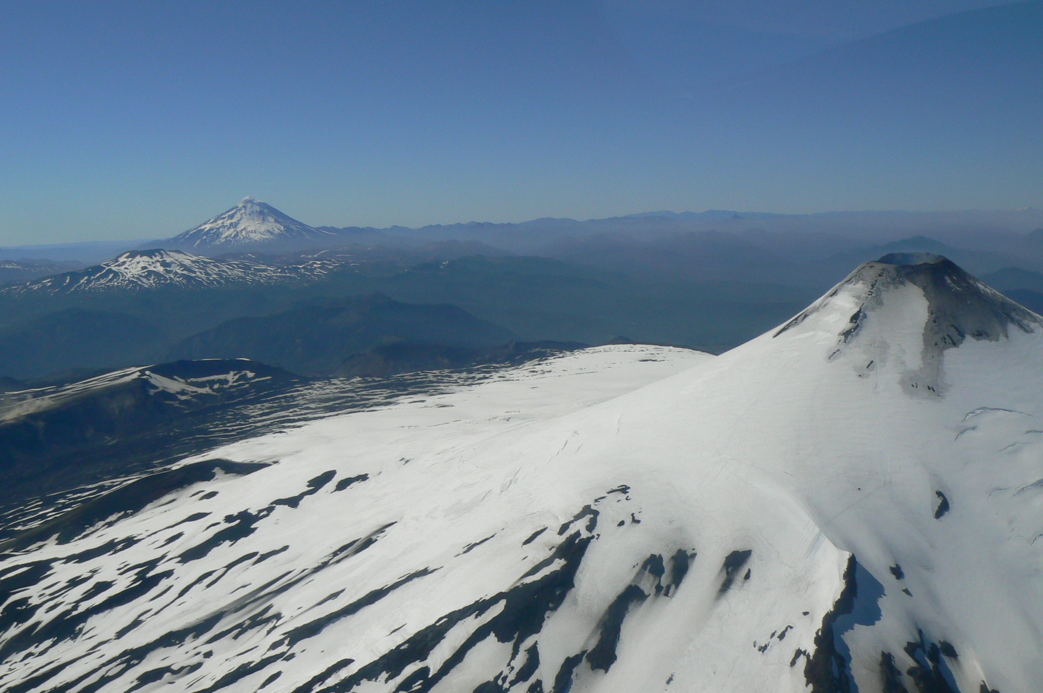 Volcanes Villarrica, Quetrupillán y Lanín.